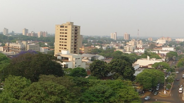 Vista parcial da região central de Dourados